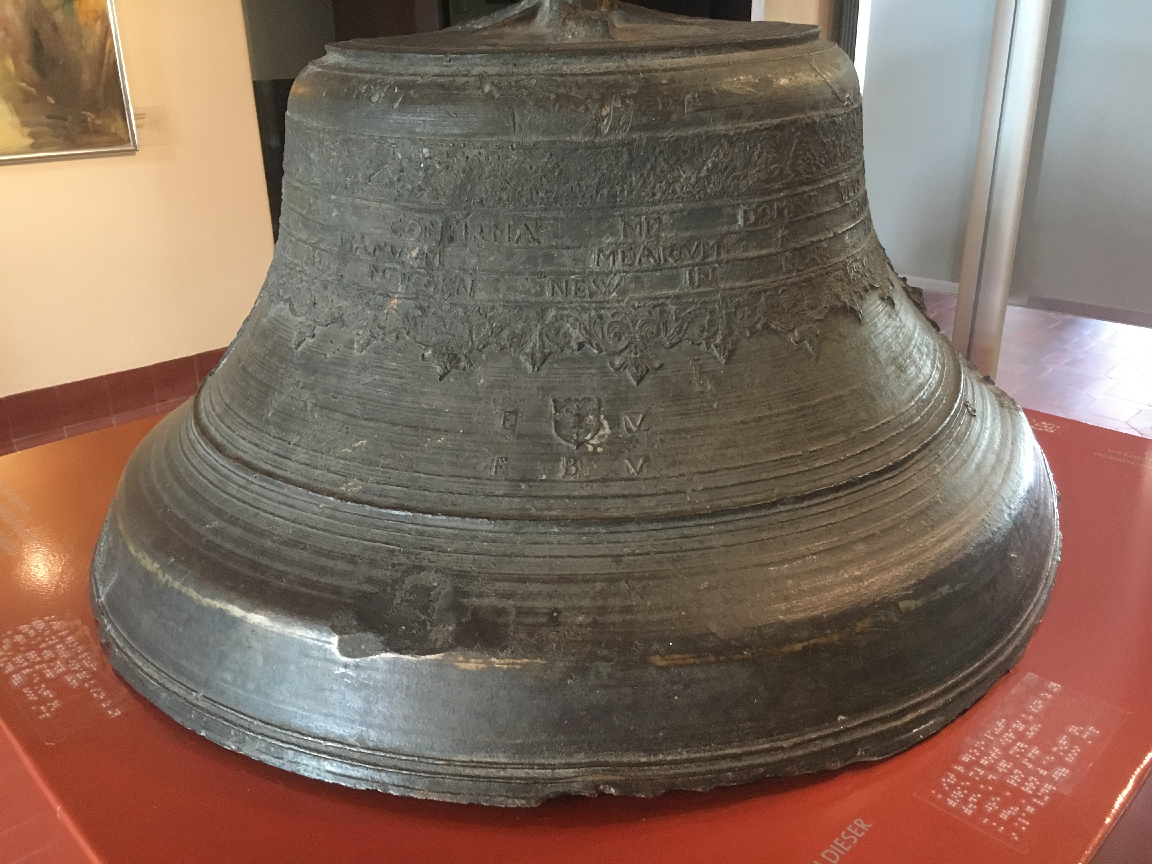 Stundenglocke des alten Rathauses Cottbus, gegossen 1671, bis 1945 im Rathausturm, beim Brand des Rathauses Schwer beschädigt